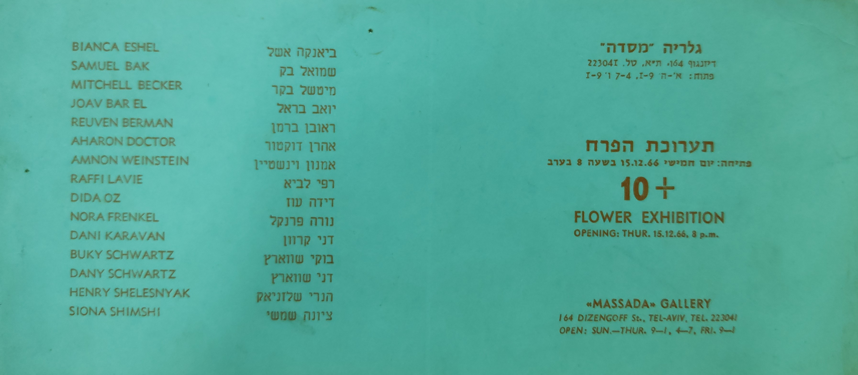 מתוך האוסף של בנו כלב